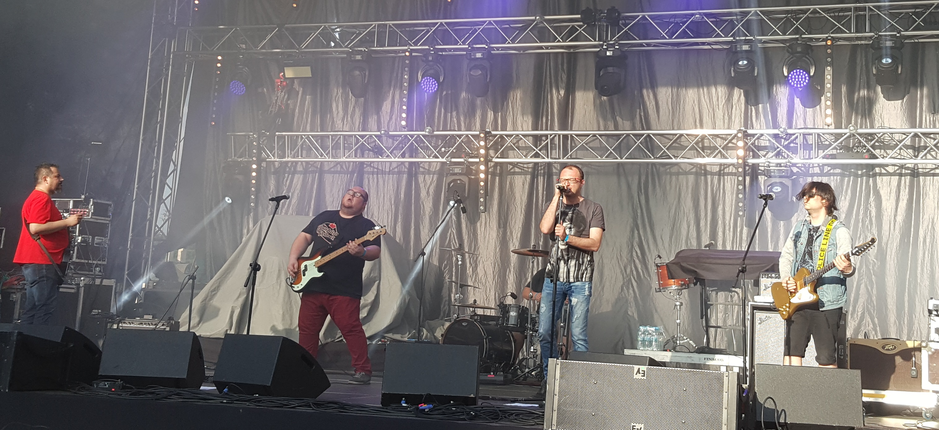 Polski zespół muzyczny Wszyscy byliśmy harcerzami w maju 2017 roku.